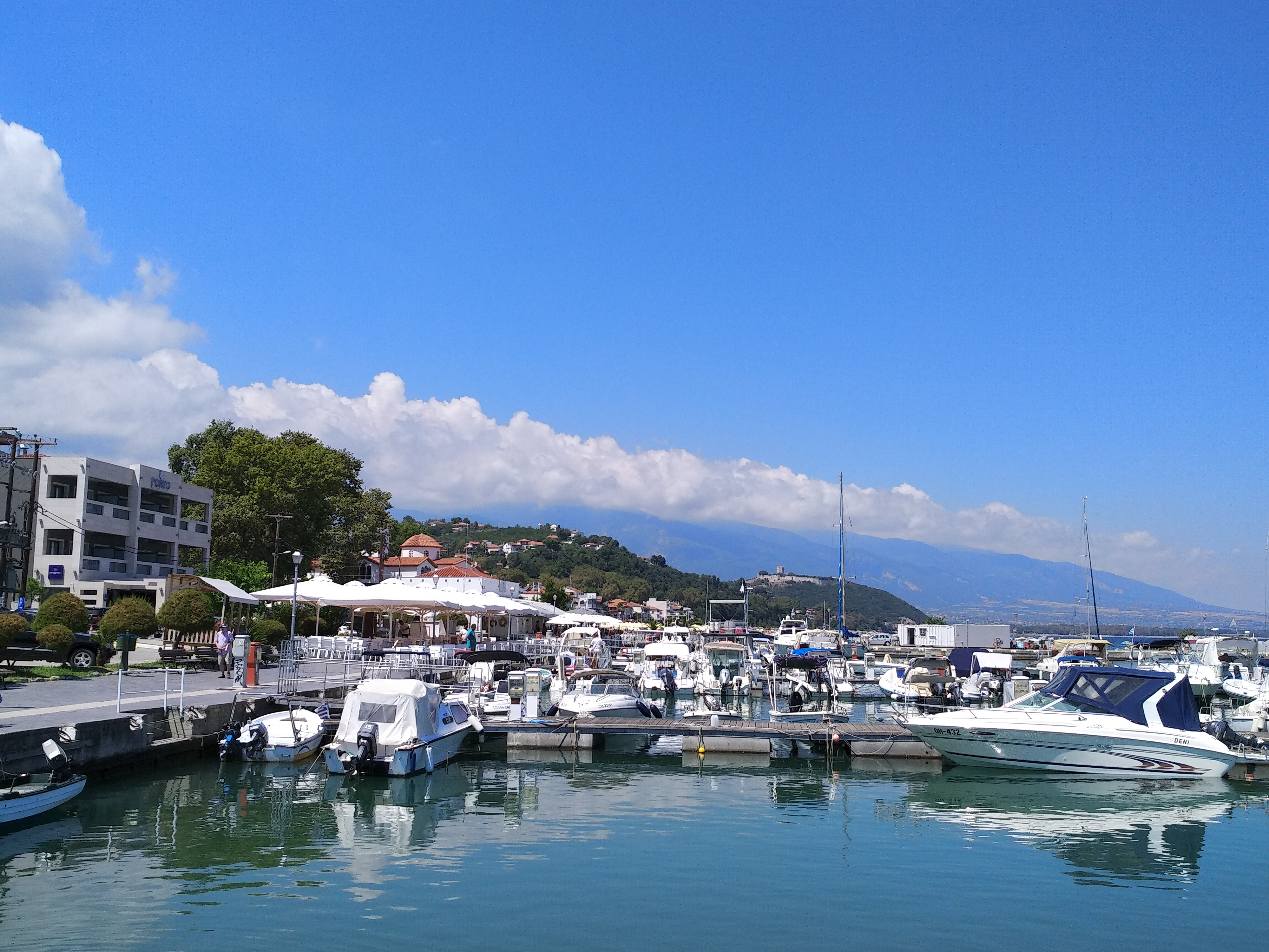 Πλαταμώνας λιμάνι 1